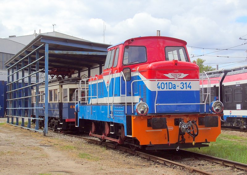 Spalinowa lokomotywa manewrowa 401Da-314 należąca do WKD stoi na terenie zaplecza technicznego przewoźnika w Grodzisku Mazowieckim.